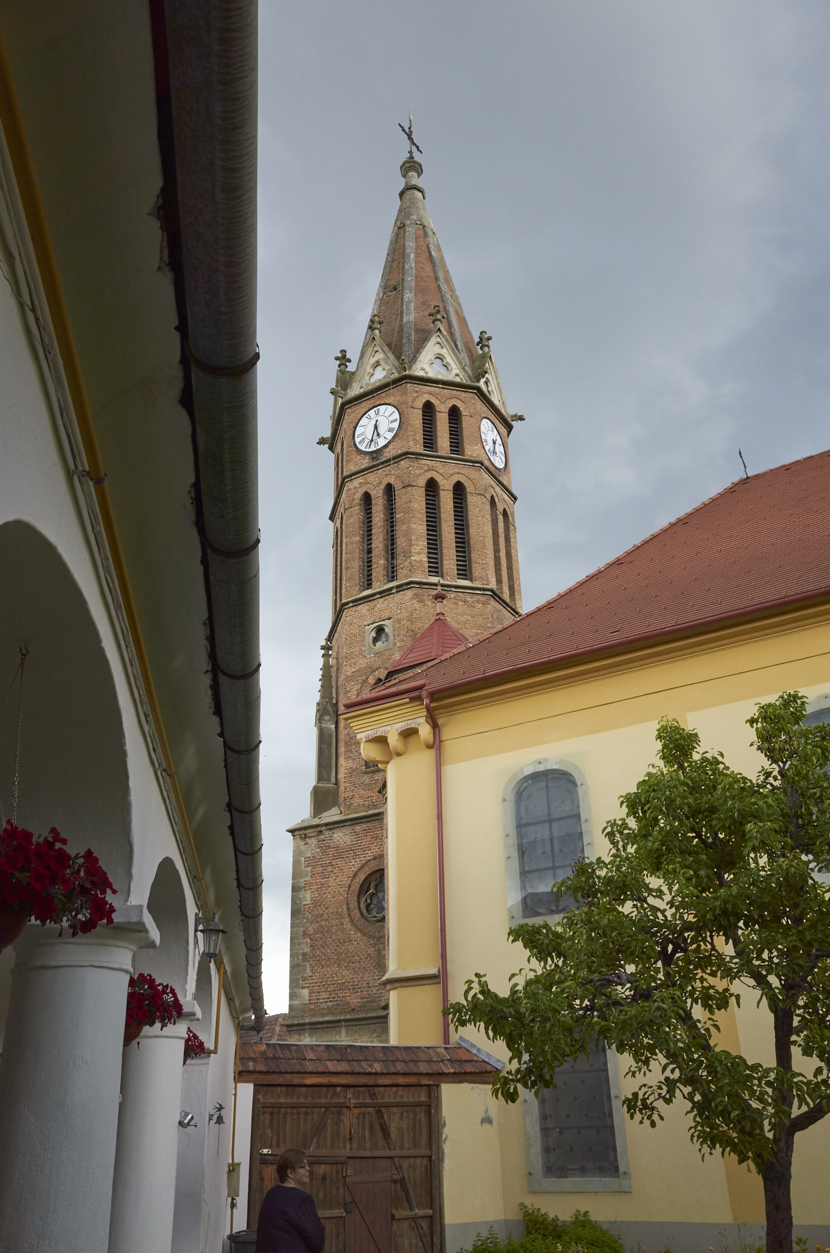 Turm der Lutherischen Kirche Ágfalva